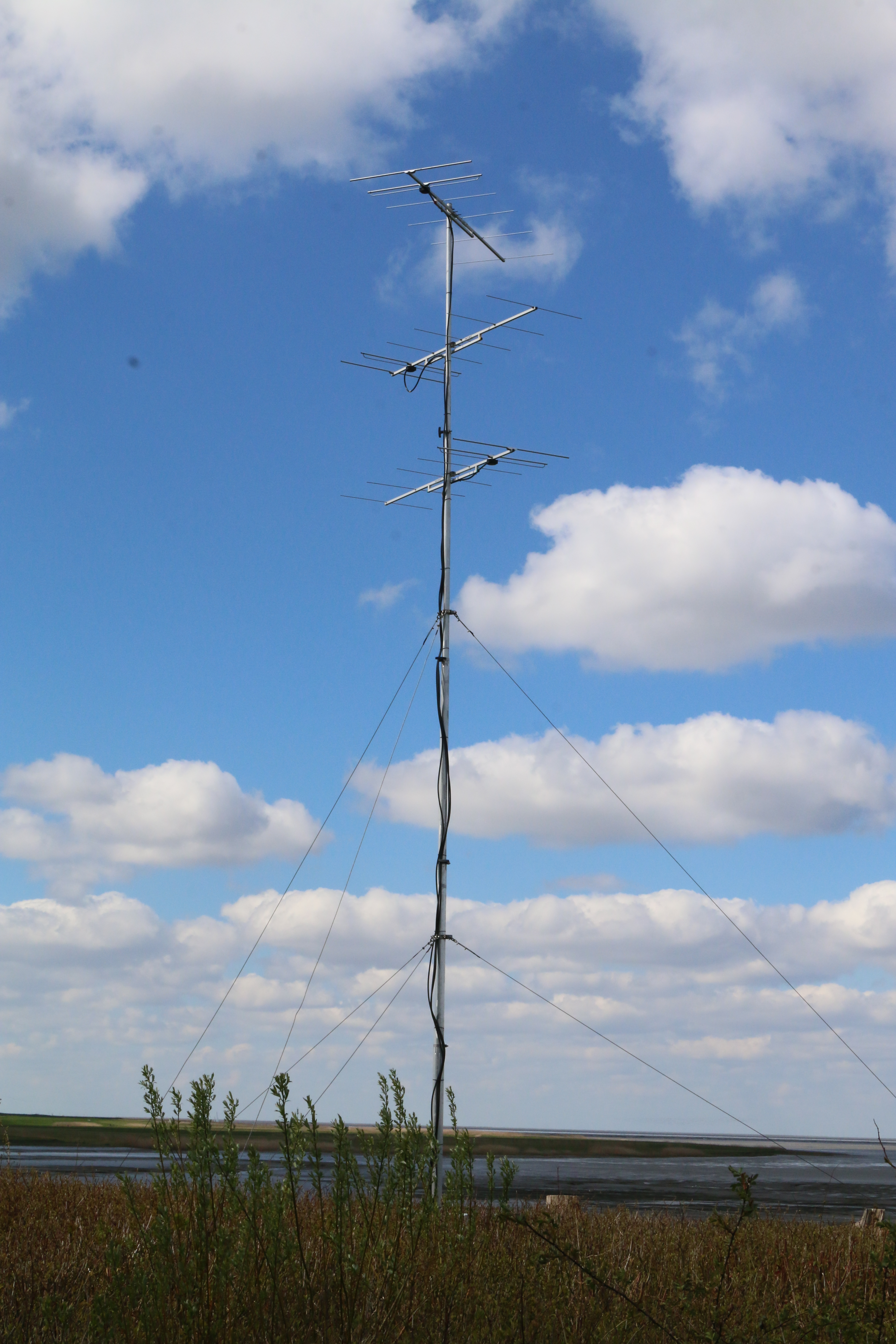 Telemetrie-Empfangsstation zur Erfassung der Zugrouten von Singvögeln während der Zugzeit (Projekt "Birdmove" der "Vogelwarte Helgoland")